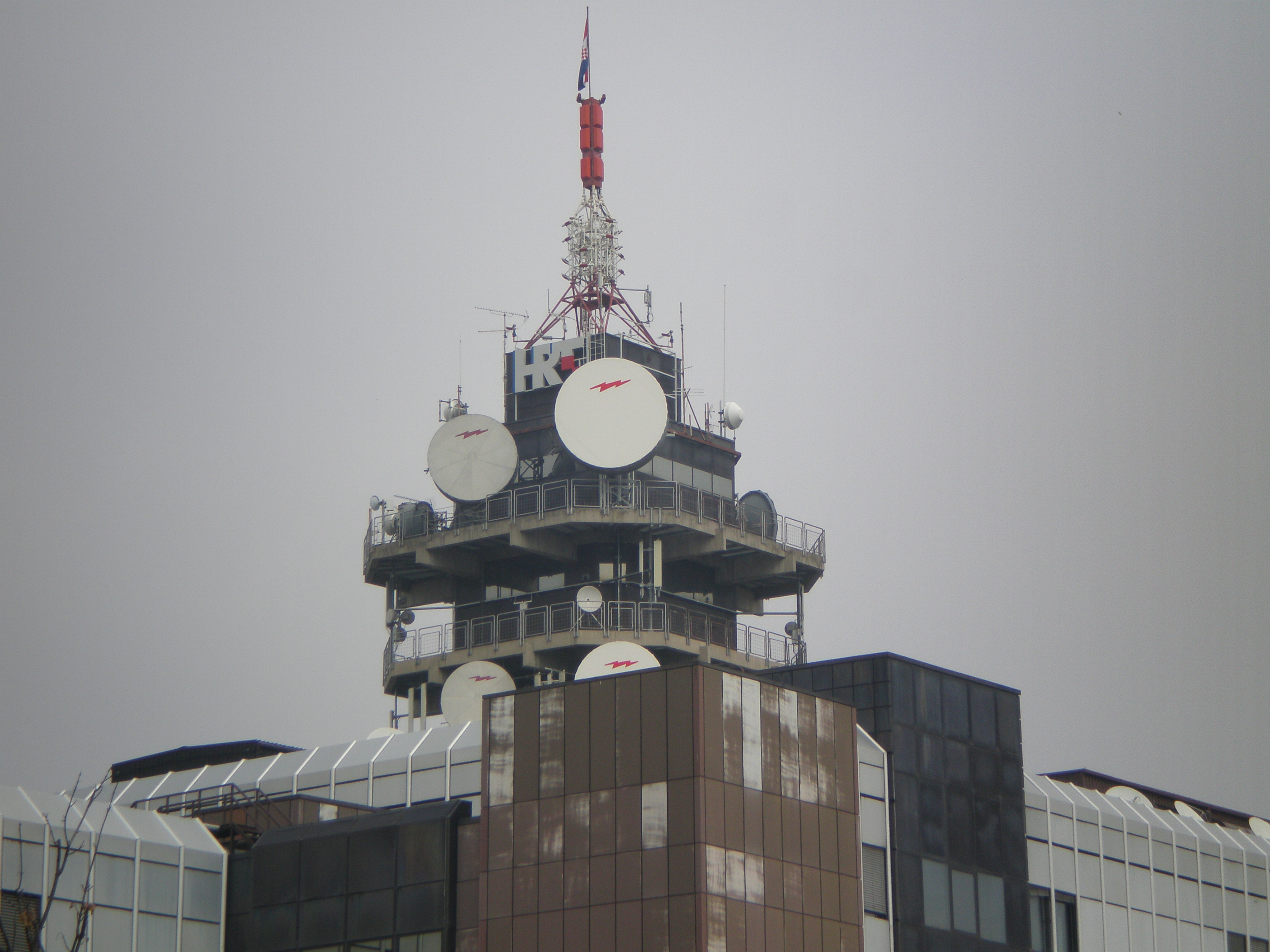 Prisavlje - HRT